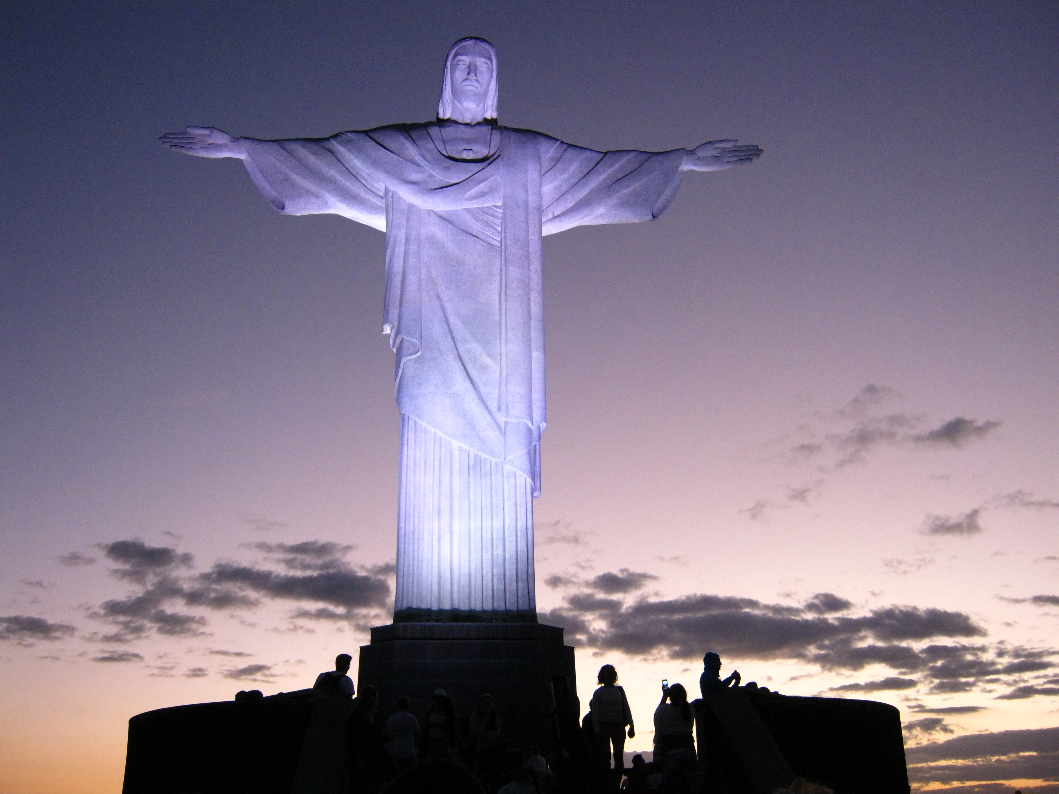 Cristo Redentor, estátua erigida no Penhasco do Corcovado.